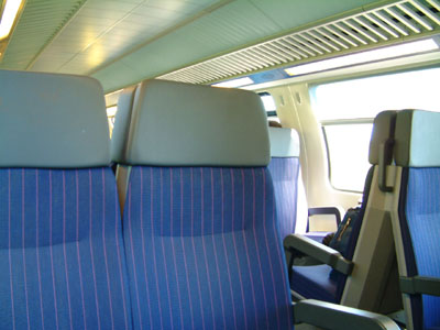 2.-Klasse-Abteil einem Doppelstockwagen der Zürcher S-Bahn